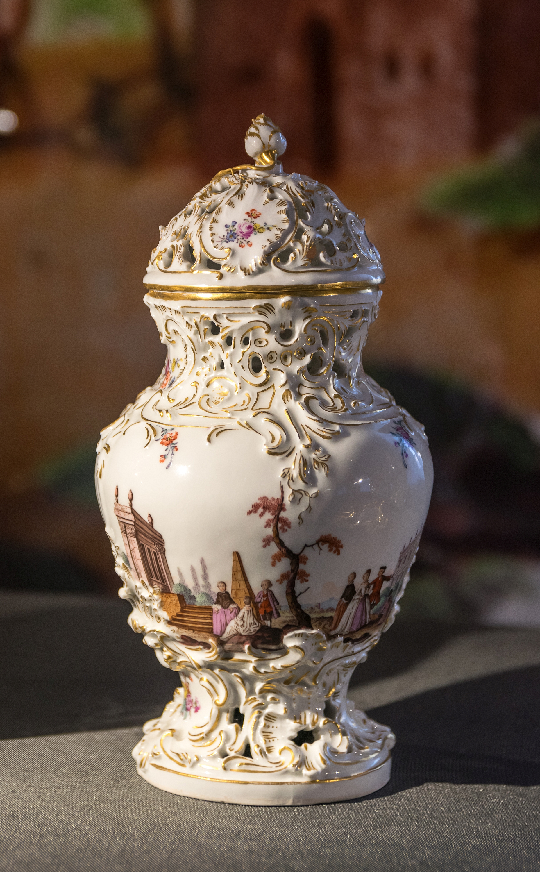 Museum Schloss Fürstenberg; Potpourrivase mit Figurenszenen, um 1770; Entwurf: wohl Simon Feilner (1726–1798), 1758/59; Dekor: Andreas Philipp Oettner (um 1735–1792)